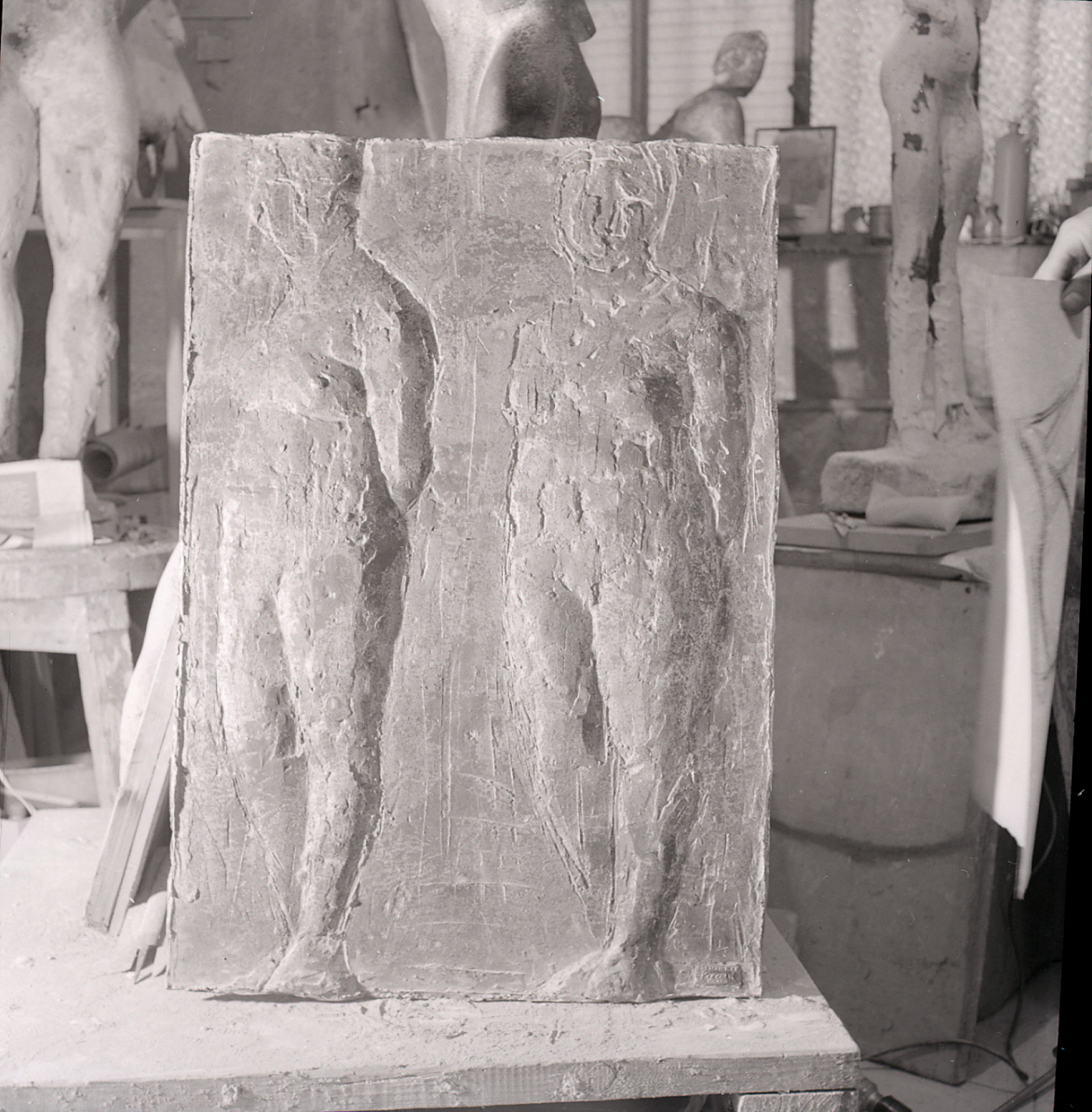 Servizio fotografico : Milano, 1960 / Paolo Monti. - Buste: 10, Fototipi: 11 : Negativo b/n, gelatina bromuro d'argento/ pellicola ; 6x6. - ((Serie costituita da 11 negativi identificati con i nn.: 23548-23558. Numerazione parallela: 164-173. La suddetta serie è contenuta nella scatola identificata con la numerazione R23214/23808. Sulla scatola manoscritto a pennarello: "Design e Arte moderna". - Fonte: Quaderno di Paolo Monti: s.t. [Soggetti e committenti] (1956-1961), presso Archivio Paolo Monti